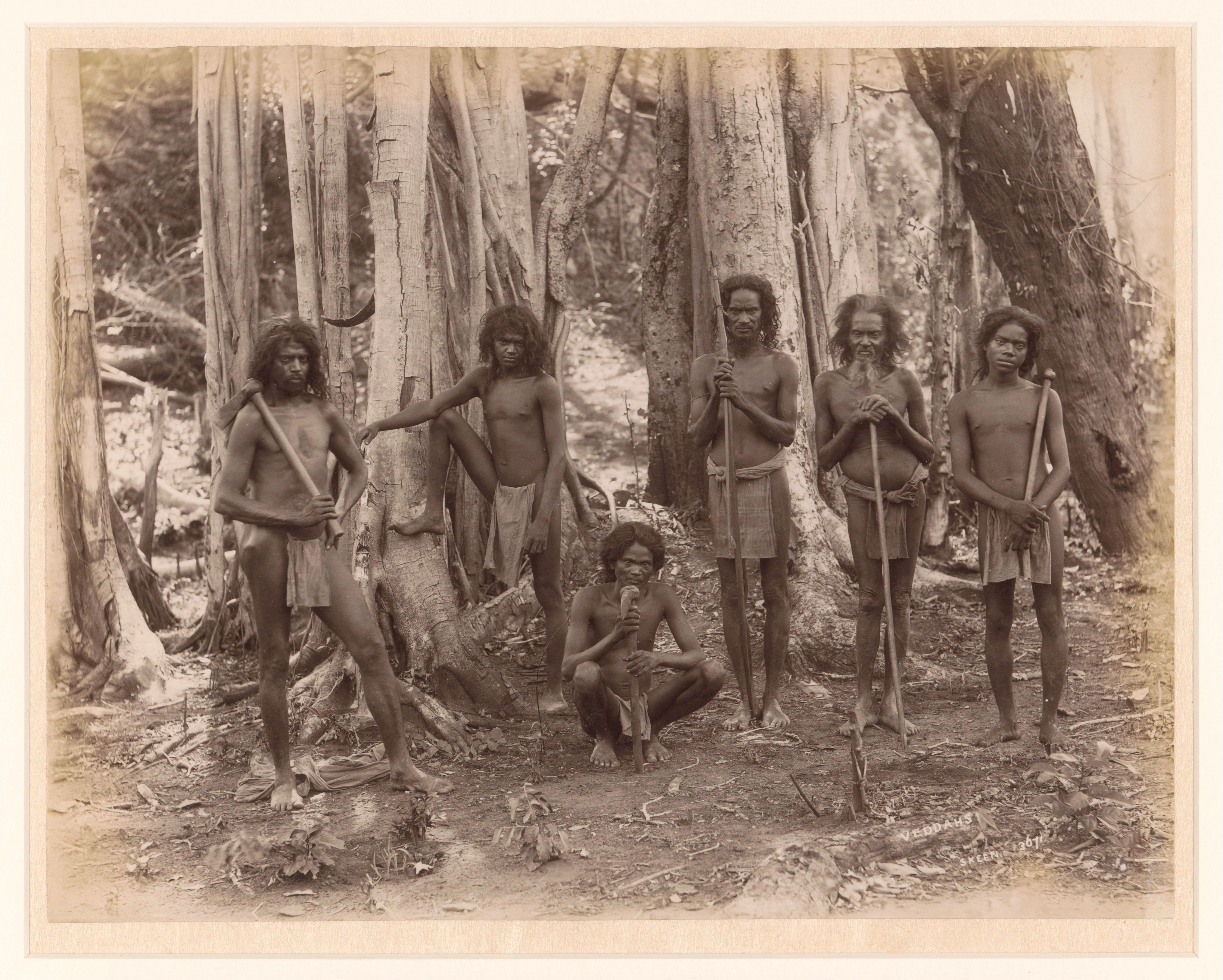 IdentificatieTitel(s): Groepsportret van Veddah mannen in de bossen van CeylonVeddahs (titel op object)Objecttype: foto Objectnummer: RP-F-F80068Opschriften / Merken: titel, recto rechtsonder, meegedrukt met negatief: ‘veddahs’signatuur, recto rechtsonder, meegedrukt met negatief: ‘Skeen’nummer, recto rechtsonder, meegedrukt met negatief: ‘3671’VervaardigingVervaardiger: fotograaf: William Louis Henry Skeen (vermeld op object)Plaats vervaardiging: Sri LankaDatering: 1870 - 1904Fysieke kenmerken: albuminedrukMateriaal: papier Techniek: albuminedrukAfmetingen: foto: h 219 mm × b 282 mmOnderwerpWaar: Sri LankaVerwerving en rechtenVerwerving: overdracht van beheer 1994Copyright: Publiek domein